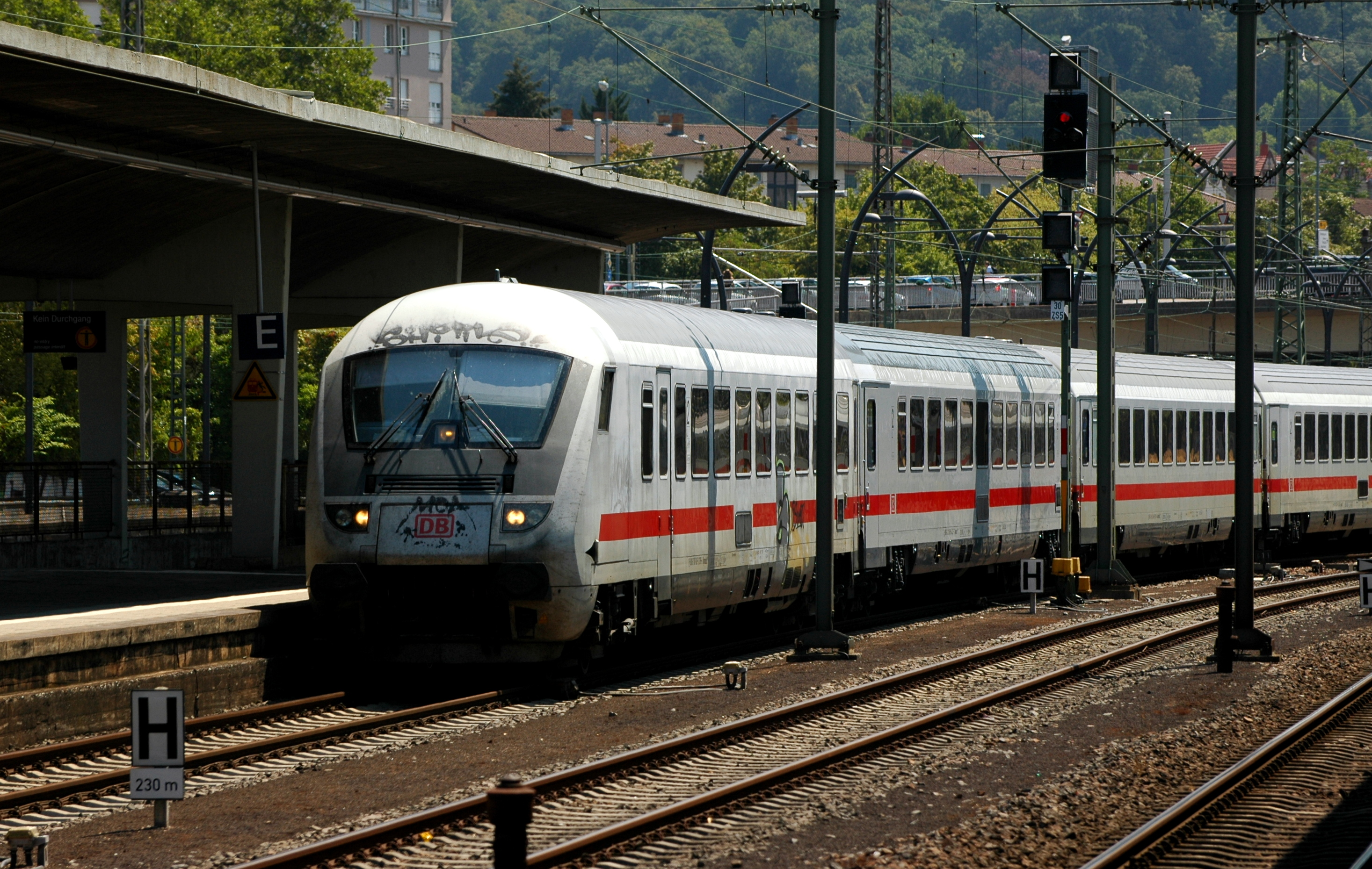 Heidelberg Hauptbahnhof